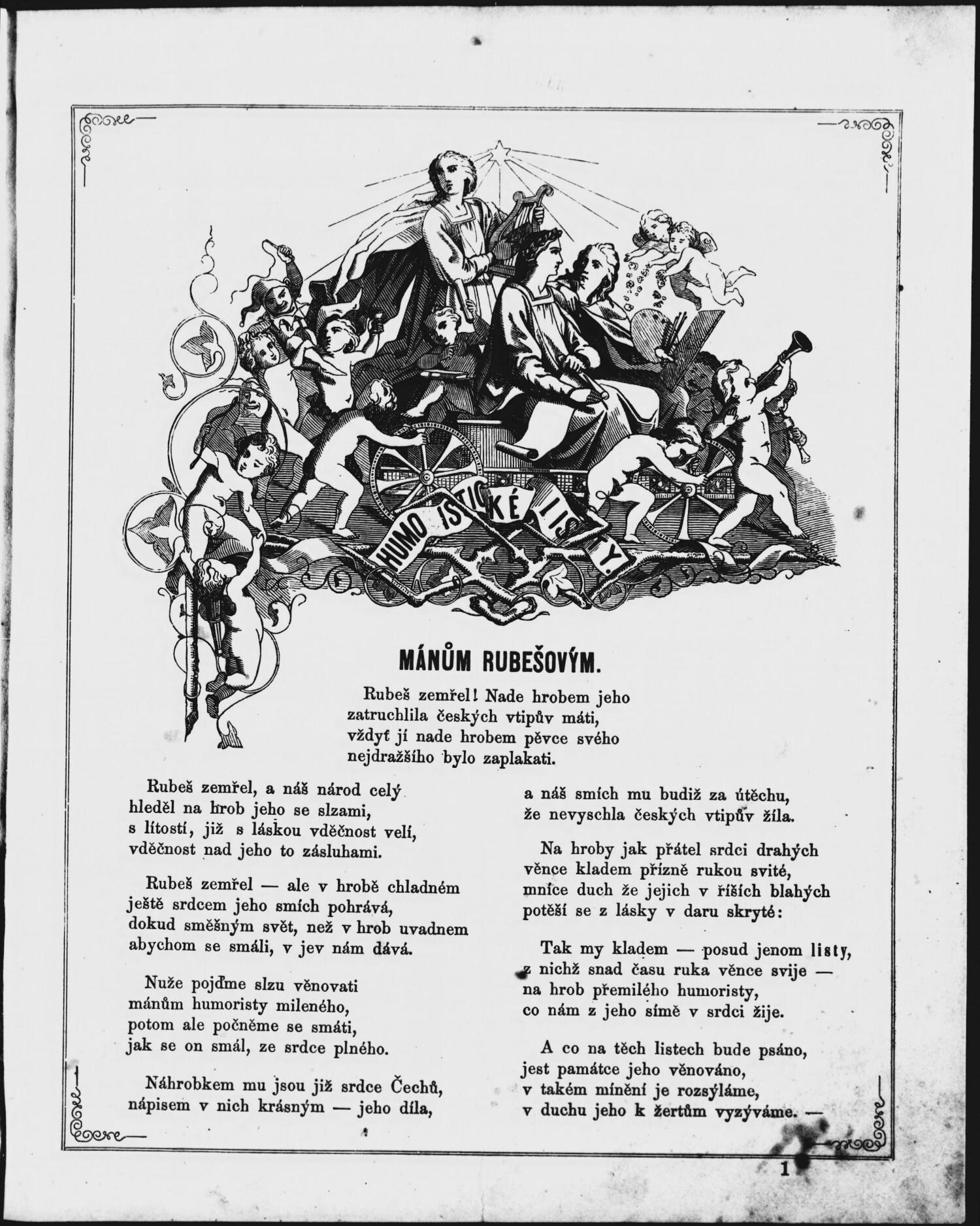 Úvodní stránka časopisu Humoristické listy, ročník 1, číslo 1.